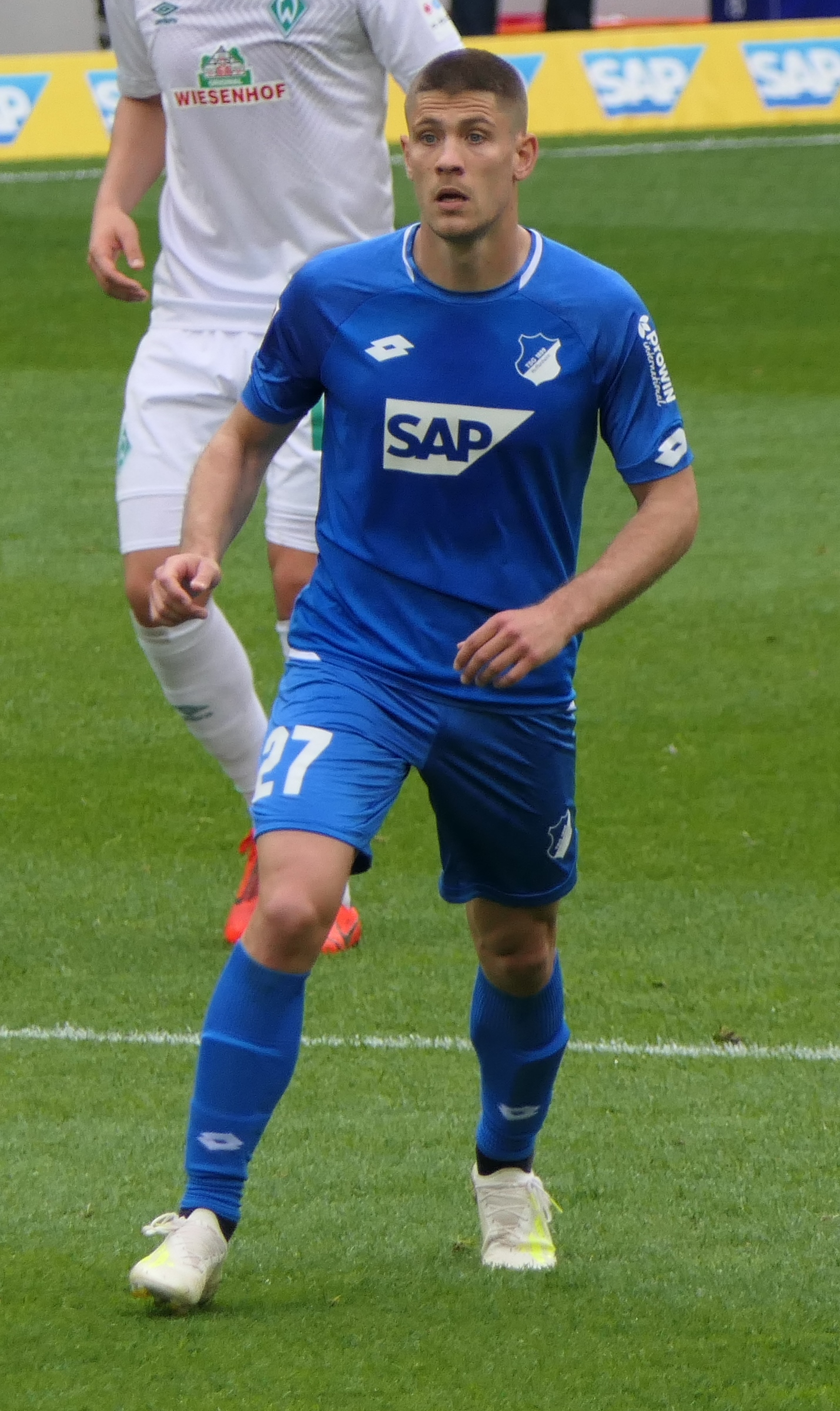 Der Fussballprofi Andrej Kramarić im Trikot der TSG 1899 Hoffenheim beim Heimspiel gegen den SV Werder Bremen am 11.05.2019.